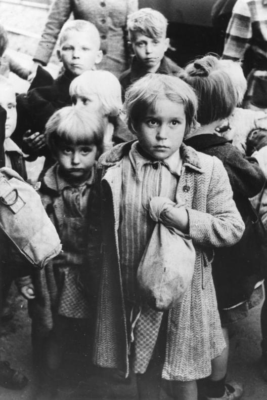 Rückführung deutscher Kinder aus Polen ADN-ZB-Illus- Was sagen diese Kinderaugen? Diese deutschen Kinder sind soeben mit einem Transport aus den polnisch besetzten Gebieten in einem kleinen Ort Westdeutschlands angekommen. Zweifel und Misstrauen liegen in dem Blick der Mädchen - denn Heimat und Muttersprache sind ihnen noch fremd. 17.8.48 [Herausgabedatum]